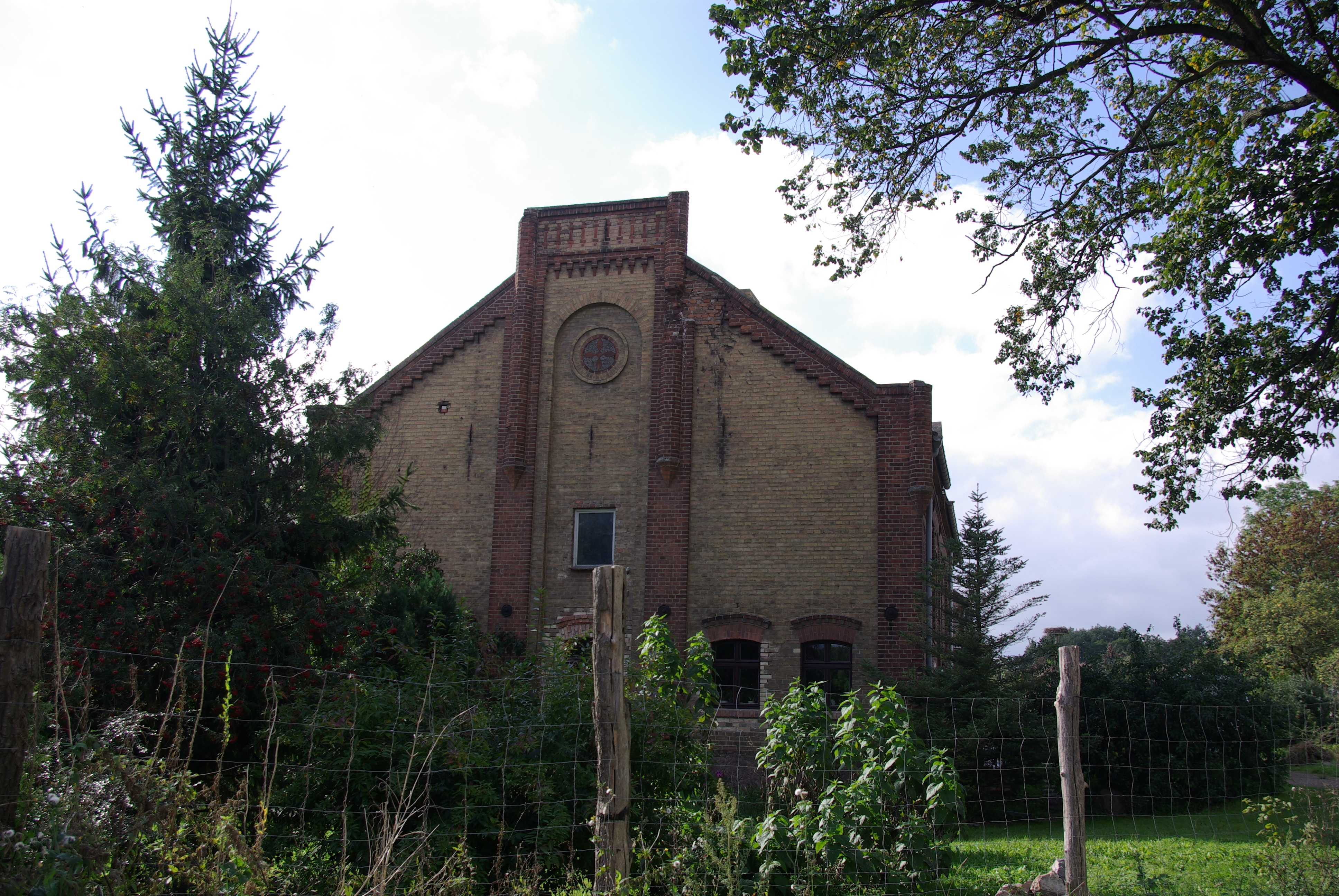 Oderaue Ortsteil Croustillier in Brandenburg. Die Scheune ist Teil der Gutsanlage.